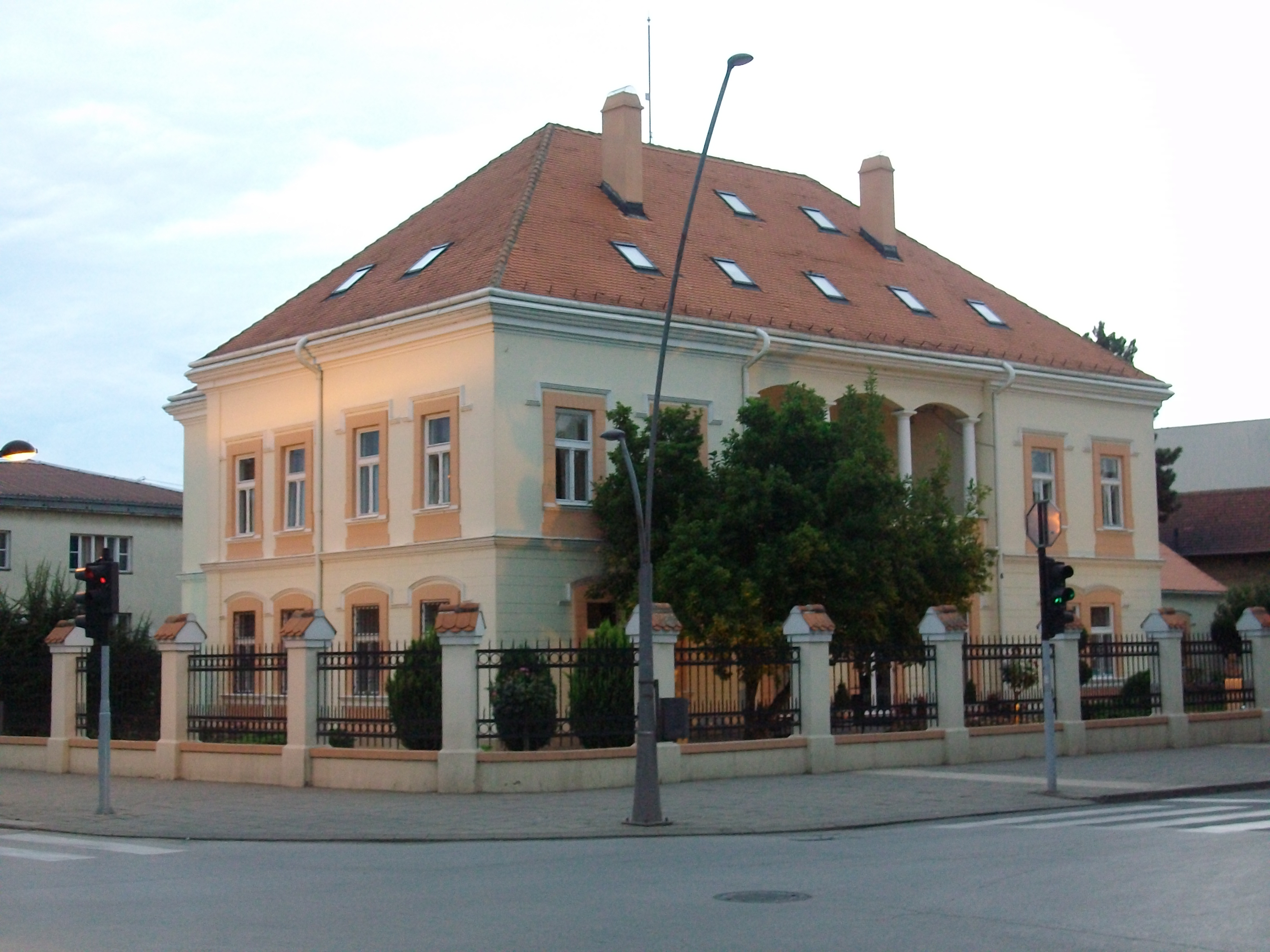 Шабачка библиотека